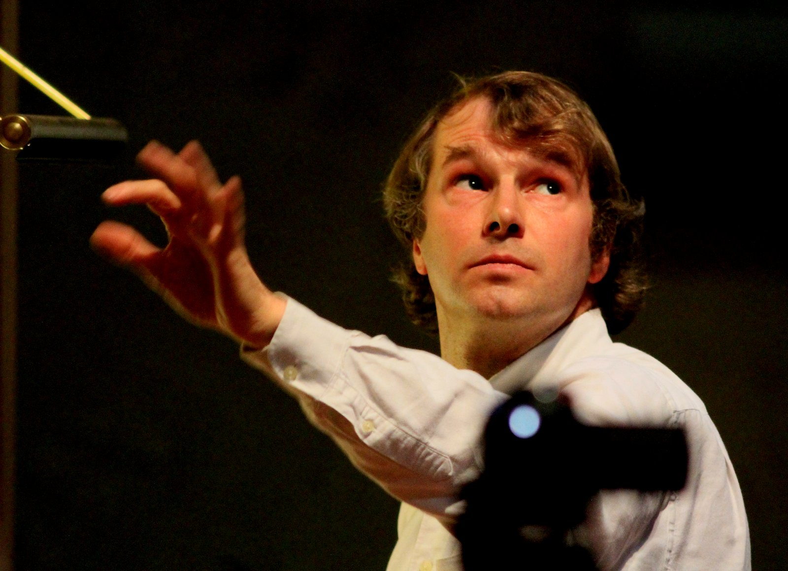 Photo de Francis Jacob après un concert à Nice